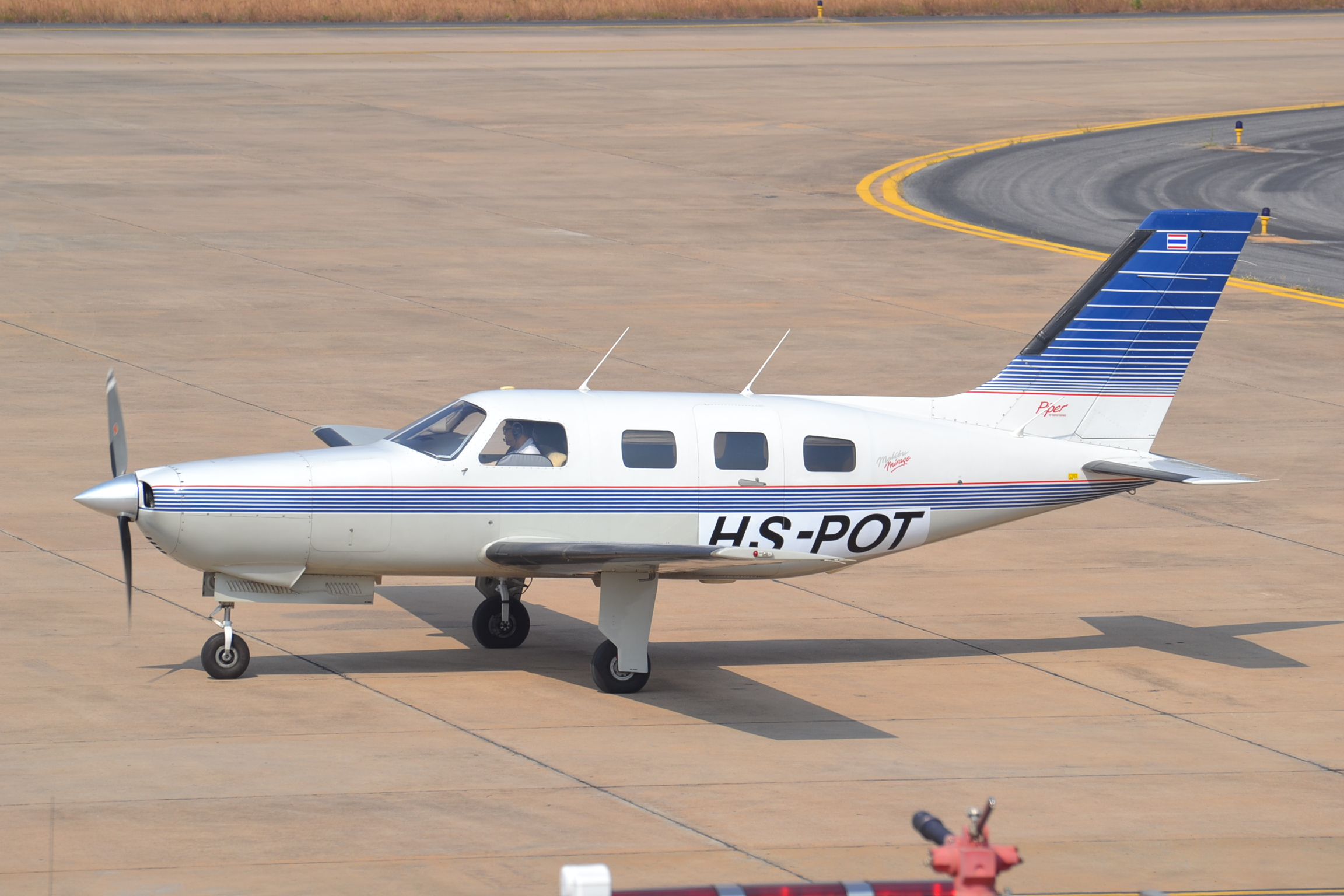 Piper PA-46 Malibu at Khon Kaen-KKC,Thailand,09/12/13.